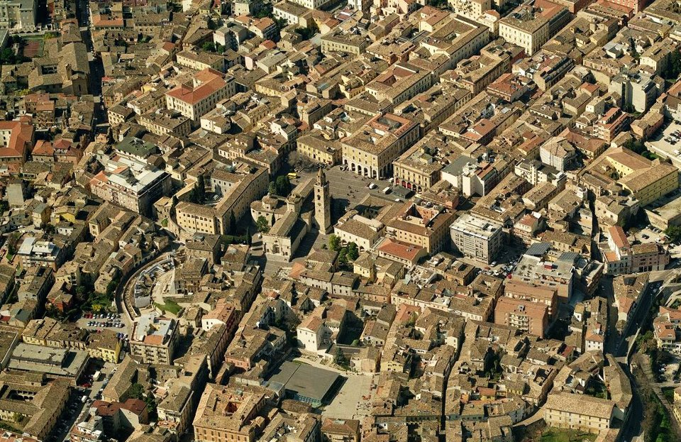 Vista aerea del centro storico di Teramo